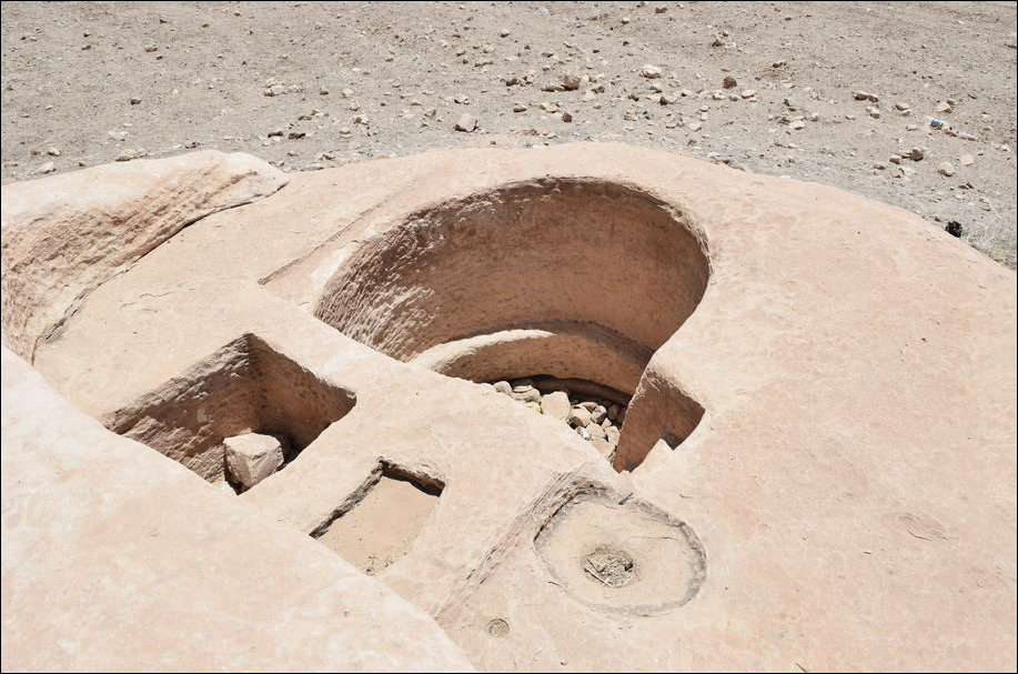 Citerne dans le roc du désert près de Pétra avec bac de décantation.